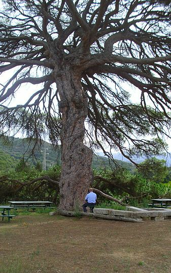 Opera scattata da Giuseppe Floris Serra, a Fluminimaggiore